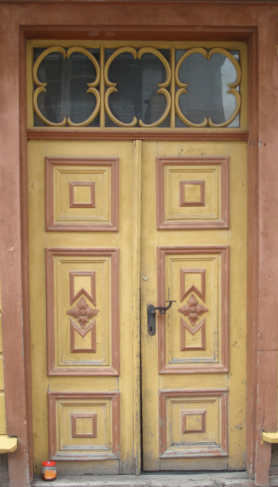 Välisuks ja framuug